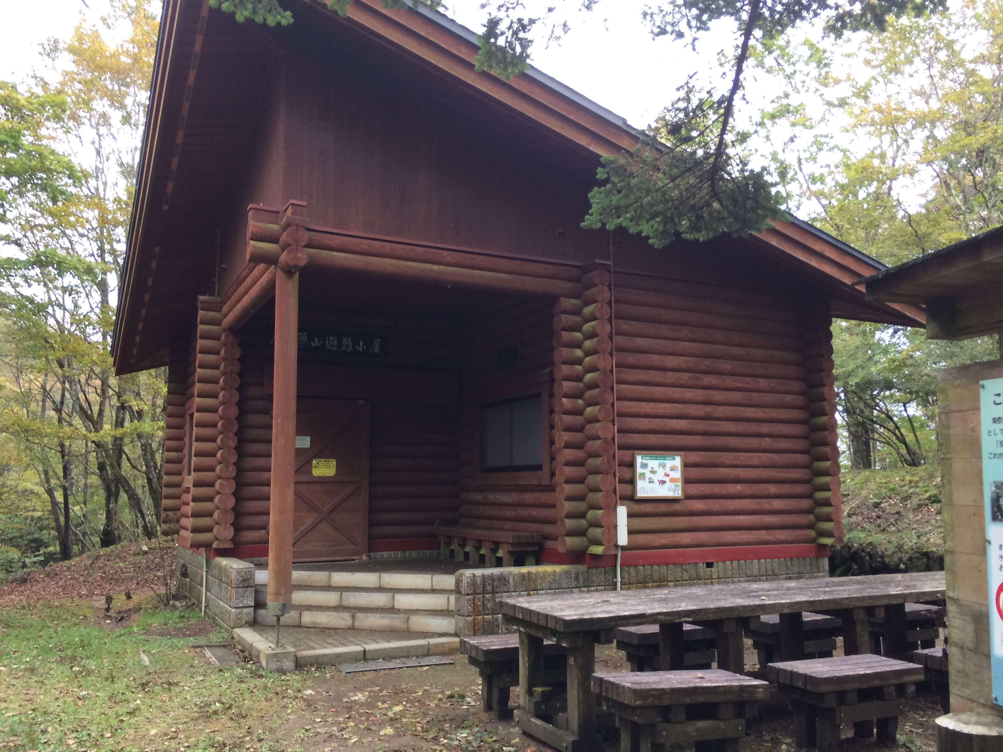 Takanosu-yama Shelter hut 鷹ノ巣山避難小屋